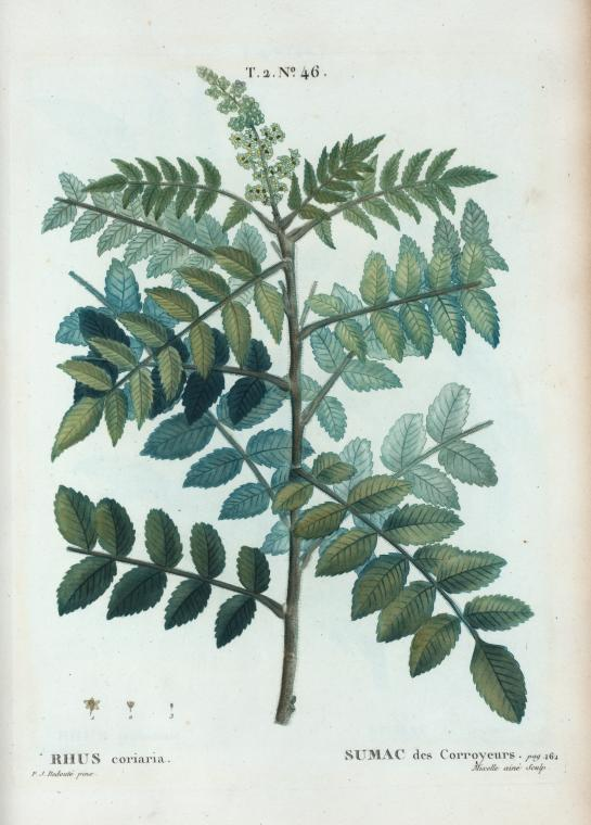 Rhus coriaria = Sumac des Corroyeurs.